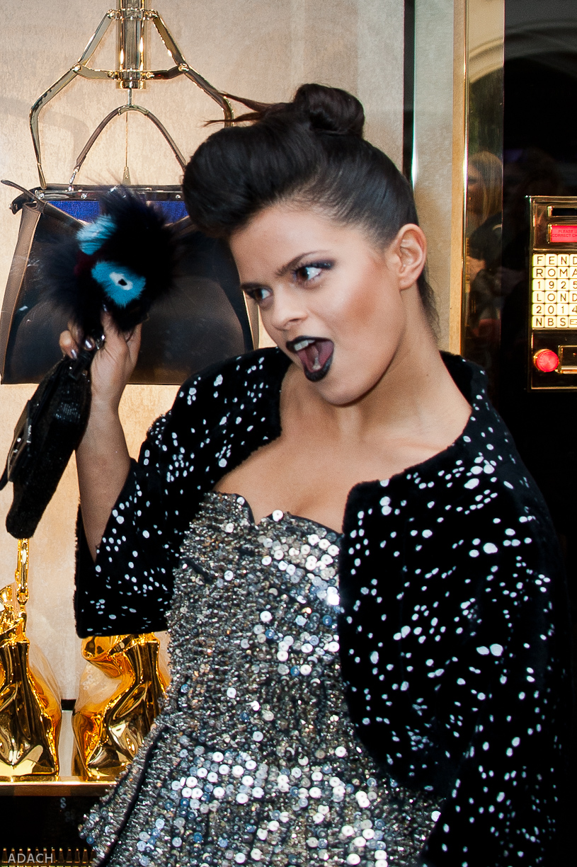 Fendi store opening - Bip Ling